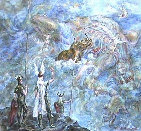 Один, Вили и Ве убили его и создали из его тела мир Мидгард.